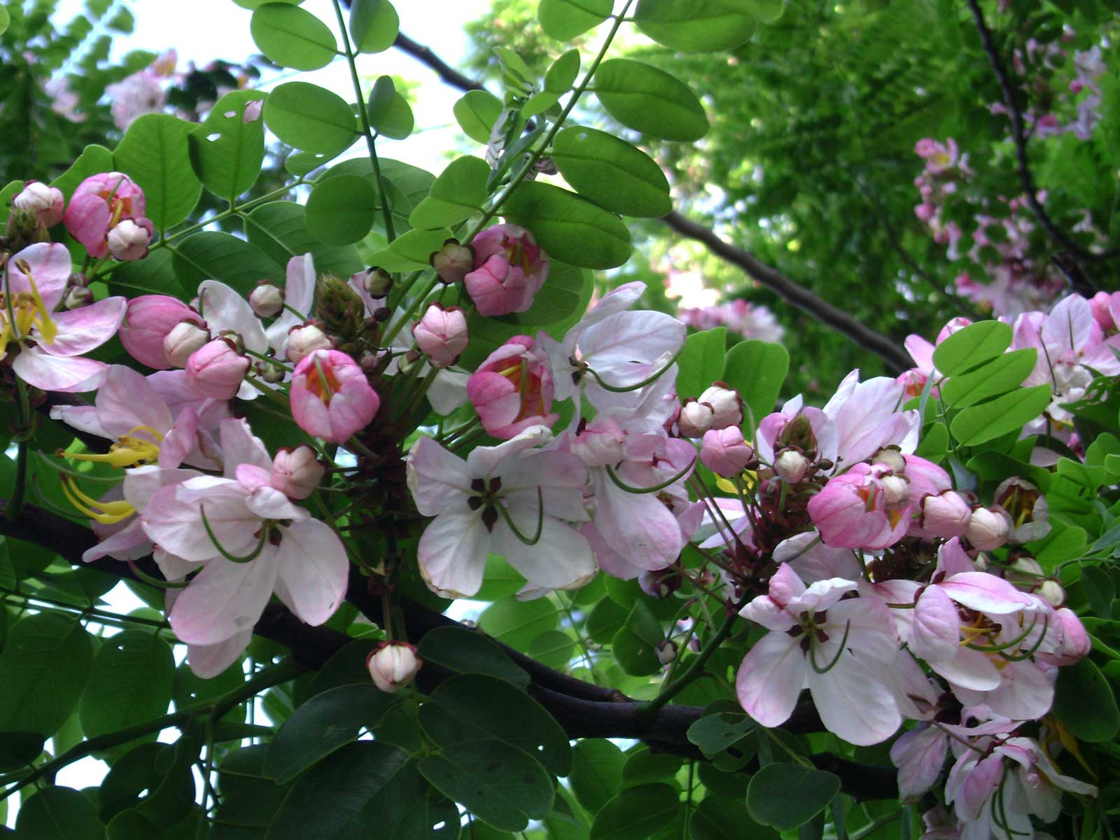 Cassia javanica; in Tonga